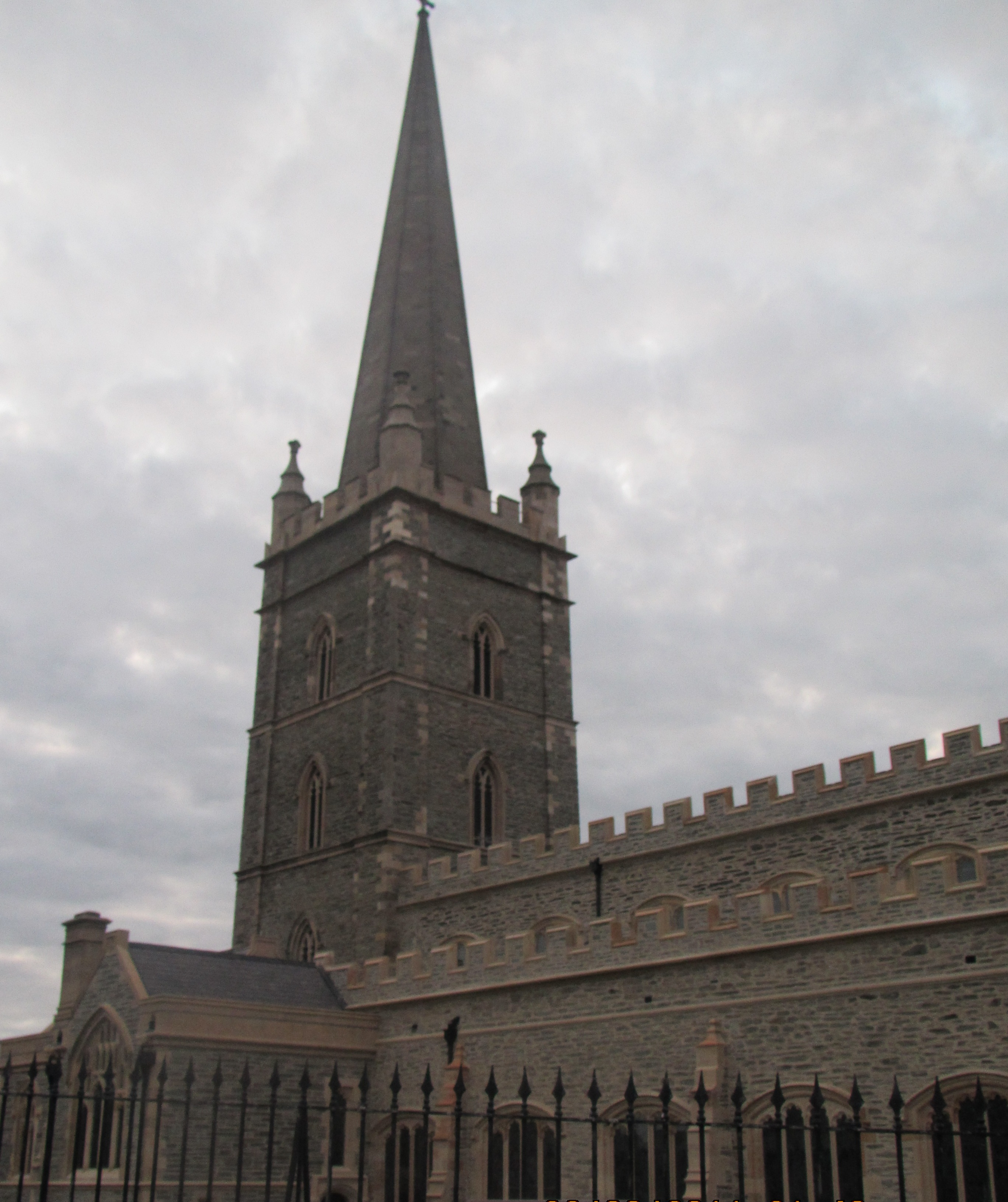 St Columb's Cathedral1 by Paride.JPG